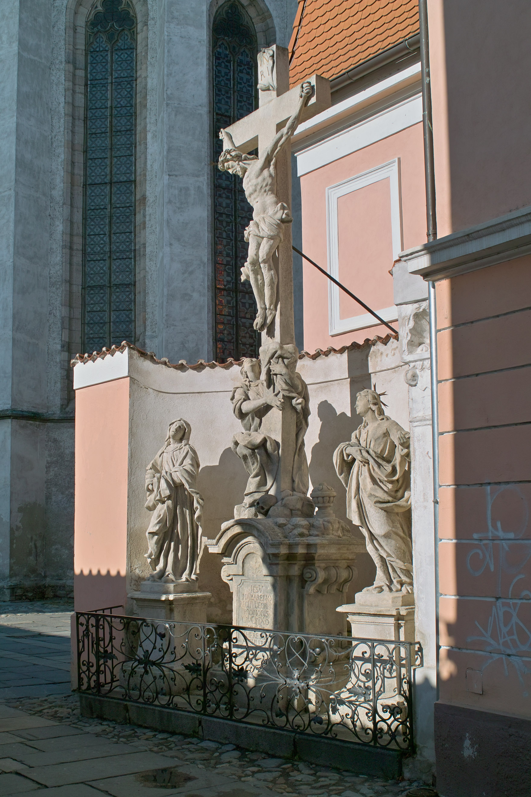 Sousoší Kalvárie od Josefa Dietricha z roku 1741 umístěné na Piaristkém náměstí, České Budějovice